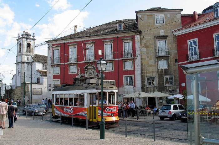 Largo da Graca em Lisboa, Portugal